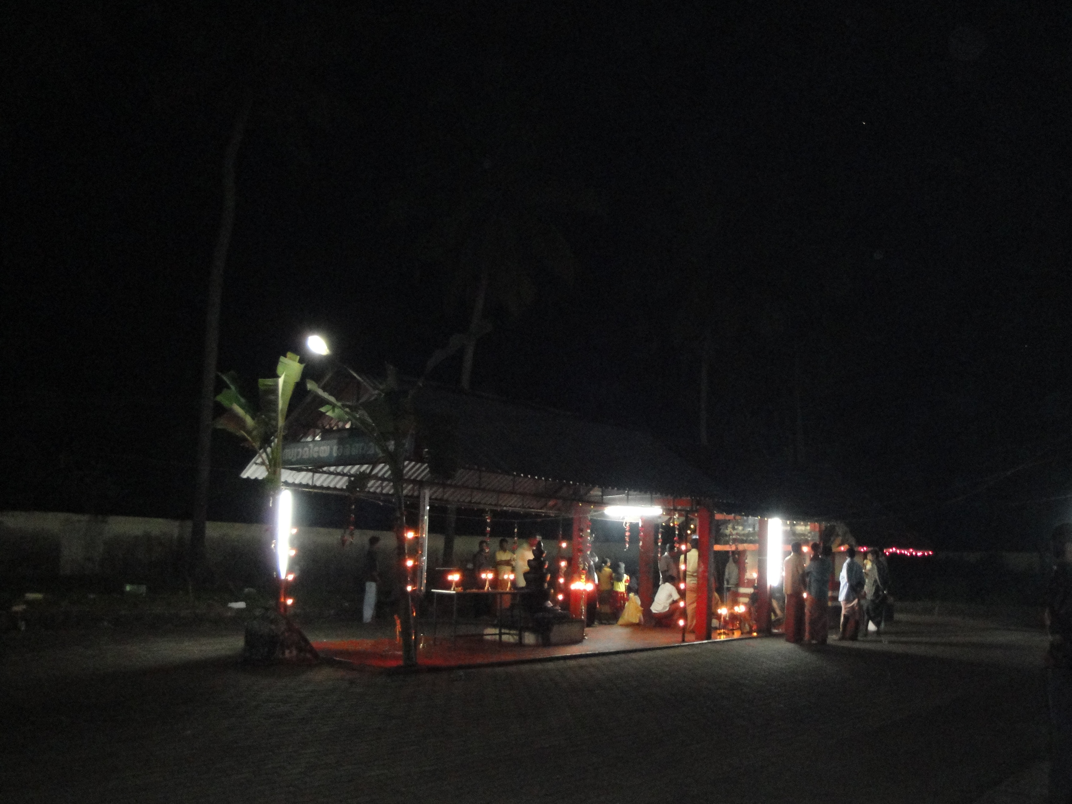 ശാസ്താക്ഷേത്രം ദീപാരാധനവേളയിൽ